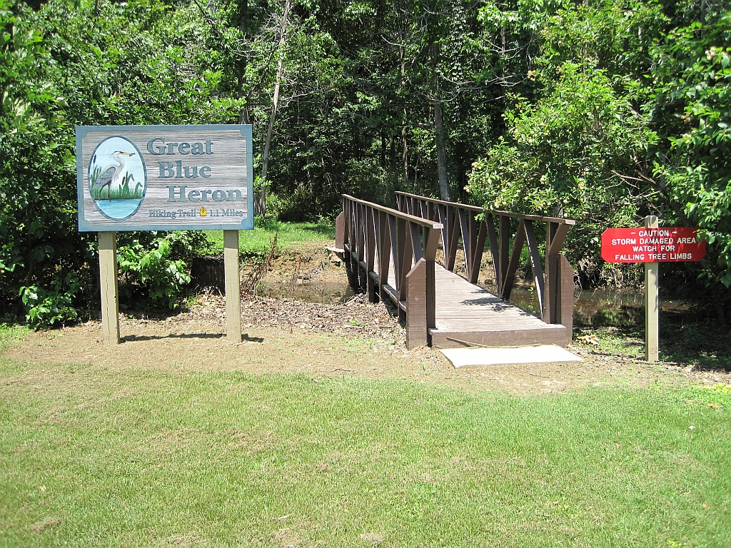 Lake Poinsett State Park, Arkansas